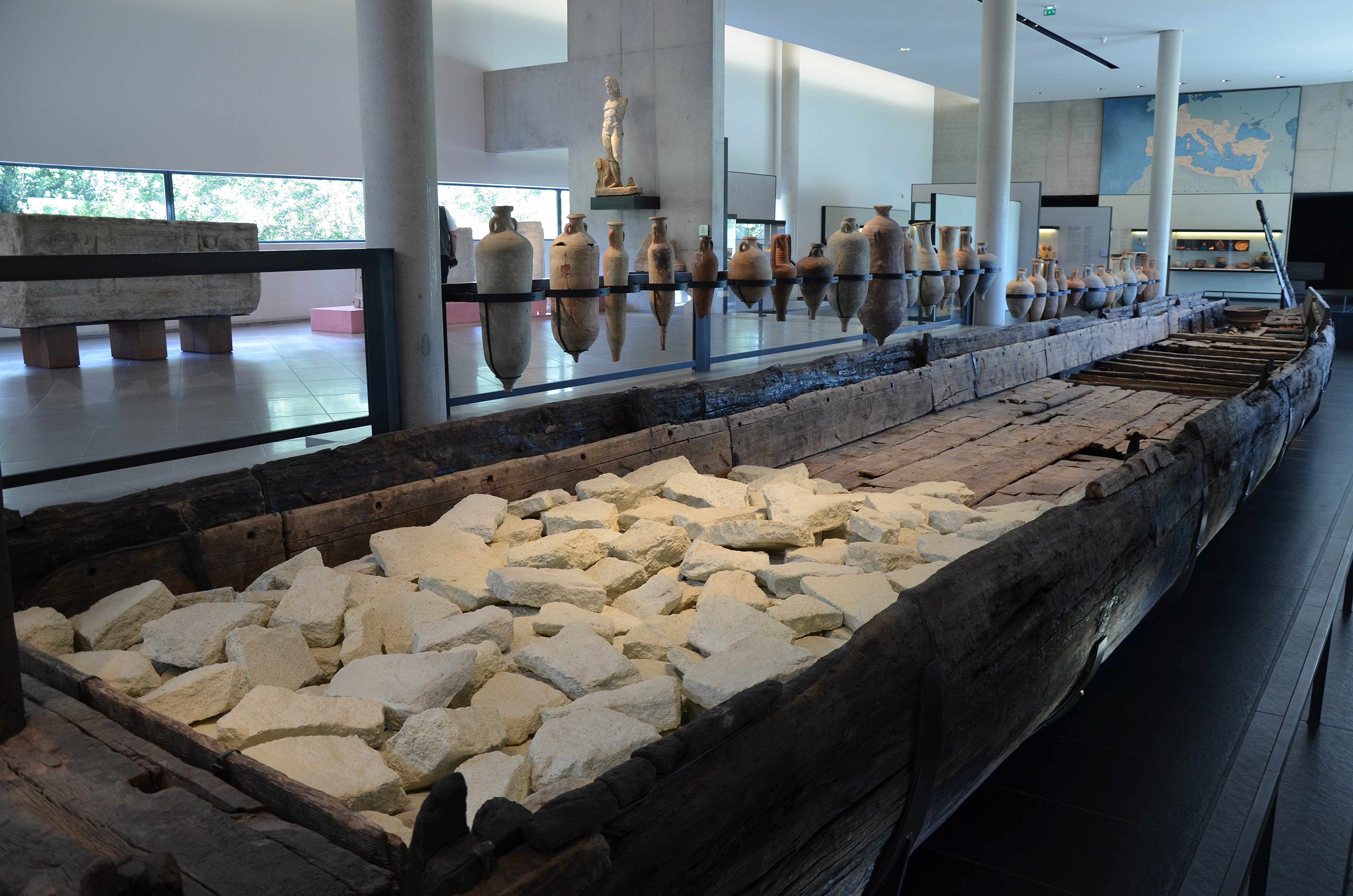 Musée de l'Arles antique, Arles, France